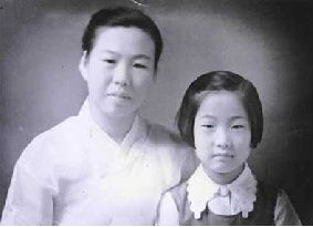 대한민국 정치인 김두한의 부인이자 배우겸 정치인 김을동의 어머니